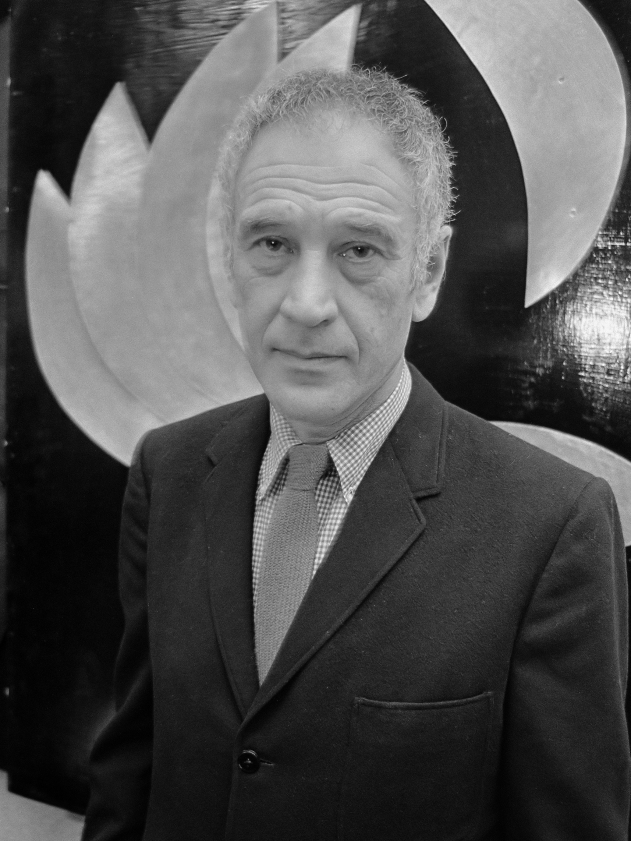 Expositie van Andre Francois in Stedelijk Museum 23 februari 1967